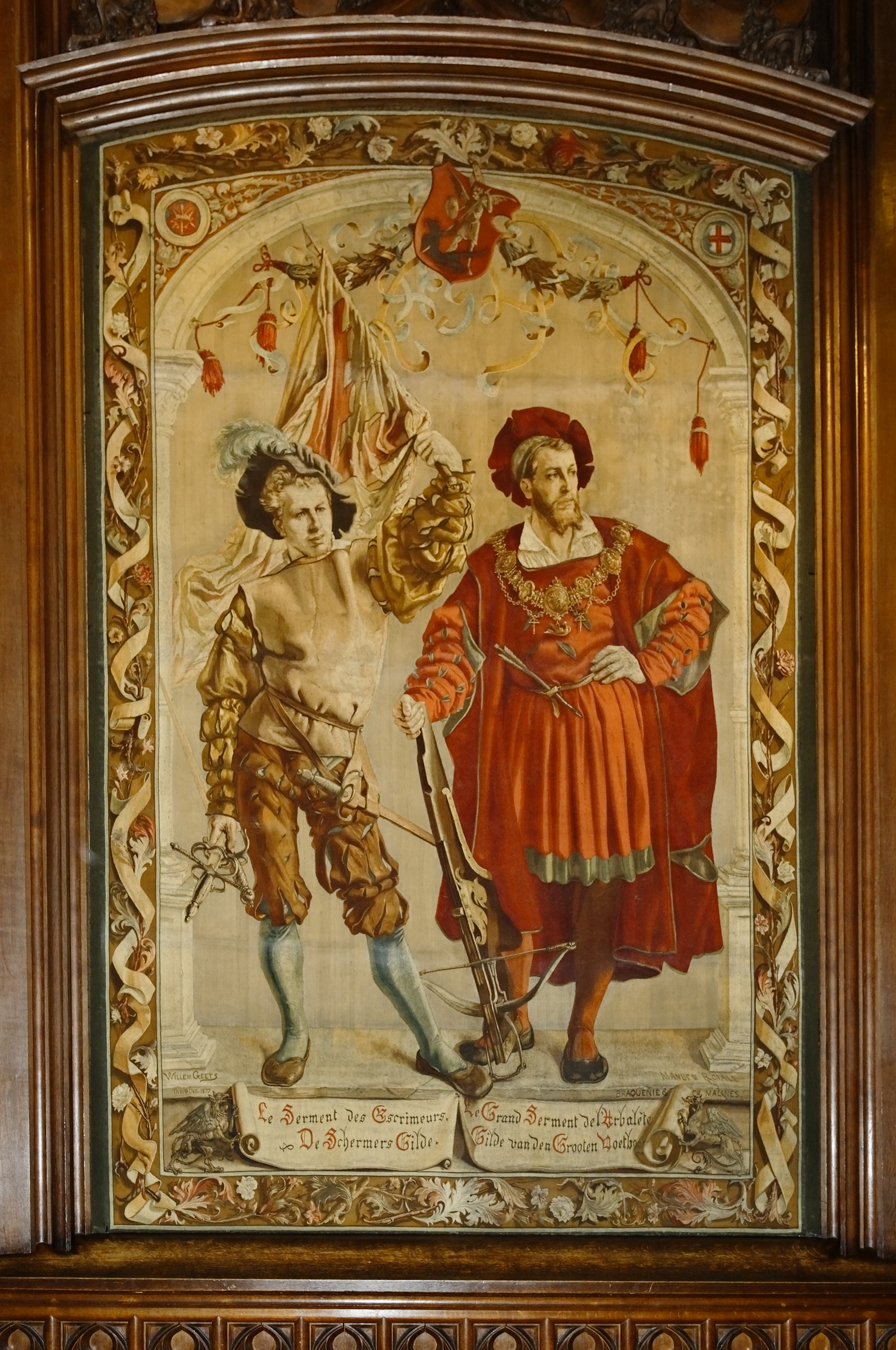 Photo tapisserie évoquant le Serment des Escrimeurs de Bruxelles. Courtoisie Jacques Lombart